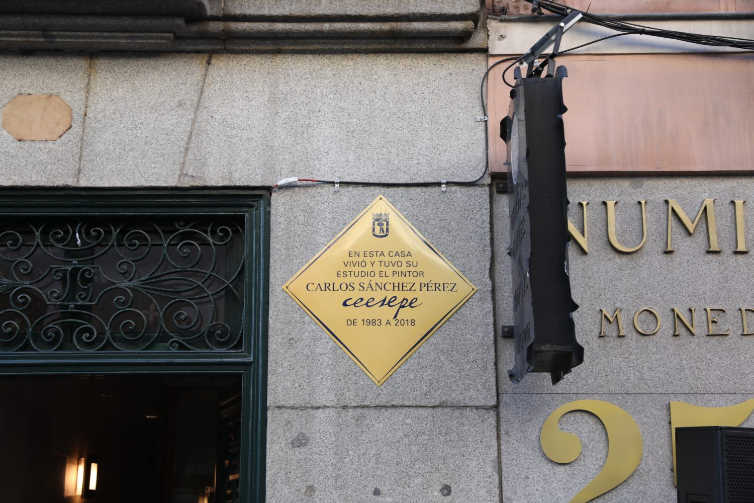 Ceesepe y Juan Cristóbal, en la memoria de Madrid El Ayuntamiento instala dos placas en las fachadas de los edificios donde los dos artistas tuvieron su residencia La placa en homenaje al escultor almeriense se ha colocado en Ortega y Gasset, 87. Al acto ha acudido su hija, Teresa En el caso de Ceesepe, ha sido en el número 23 de la Calle Mayor, donde el artista tuvo su casa y su estudio 05/03/2019 Dos artistas, un escultor, Juan Cristóbal González; un pintor, ilustrador, toda una referencia de los años 80 del siglo pasado, César Sánchez Pérez, Ceesepe. Los dos, grandes representantes del arte español del siglo XX, fuertemente vinculados a la historia de Madrid. Por eso el Ayuntamiento de la capital ha colocado dos placas en las fachadas de los edificios donde ambos tuvieron su residencia, dentro del Plan Memoria de Madrid.